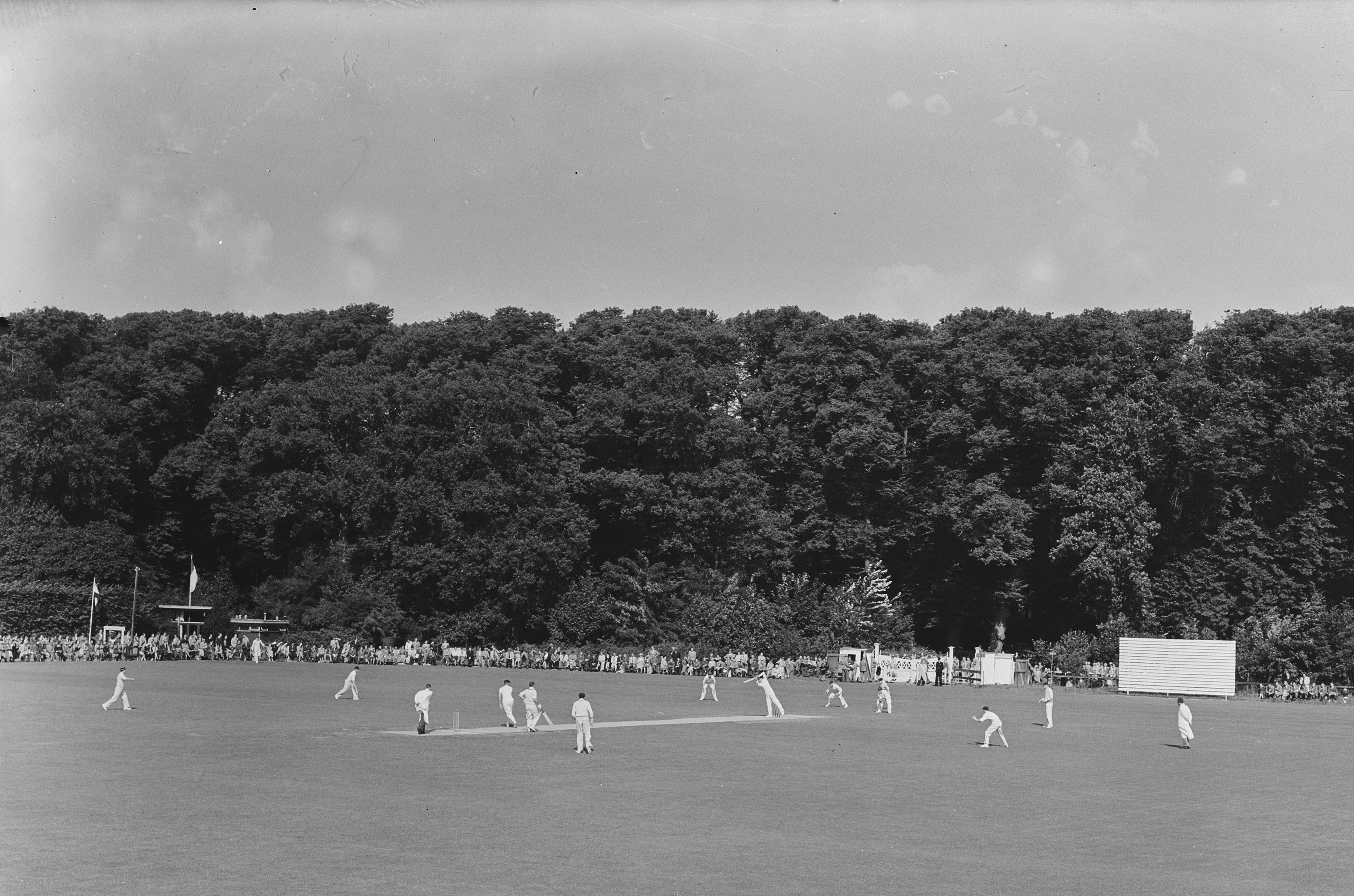 Collectie / Archief : Fotocollectie Anefo Reportage / Serie : [ onbekend ] Beschrijving : Cricket Nederland tegen Zuid-Afrika Datum : 16 september 1951 Locatie : Nederland, Zuid-Afrika Trefwoorden : CRICKET Fotograaf : Pot, Harry / Anefo Auteursrechthebbende : Nationaal Archief Materiaalsoort : Glasnegatief Nummer archiefinventaris : bekijk toegang 2.24.01.09 Bestanddeelnummer : 904-7668